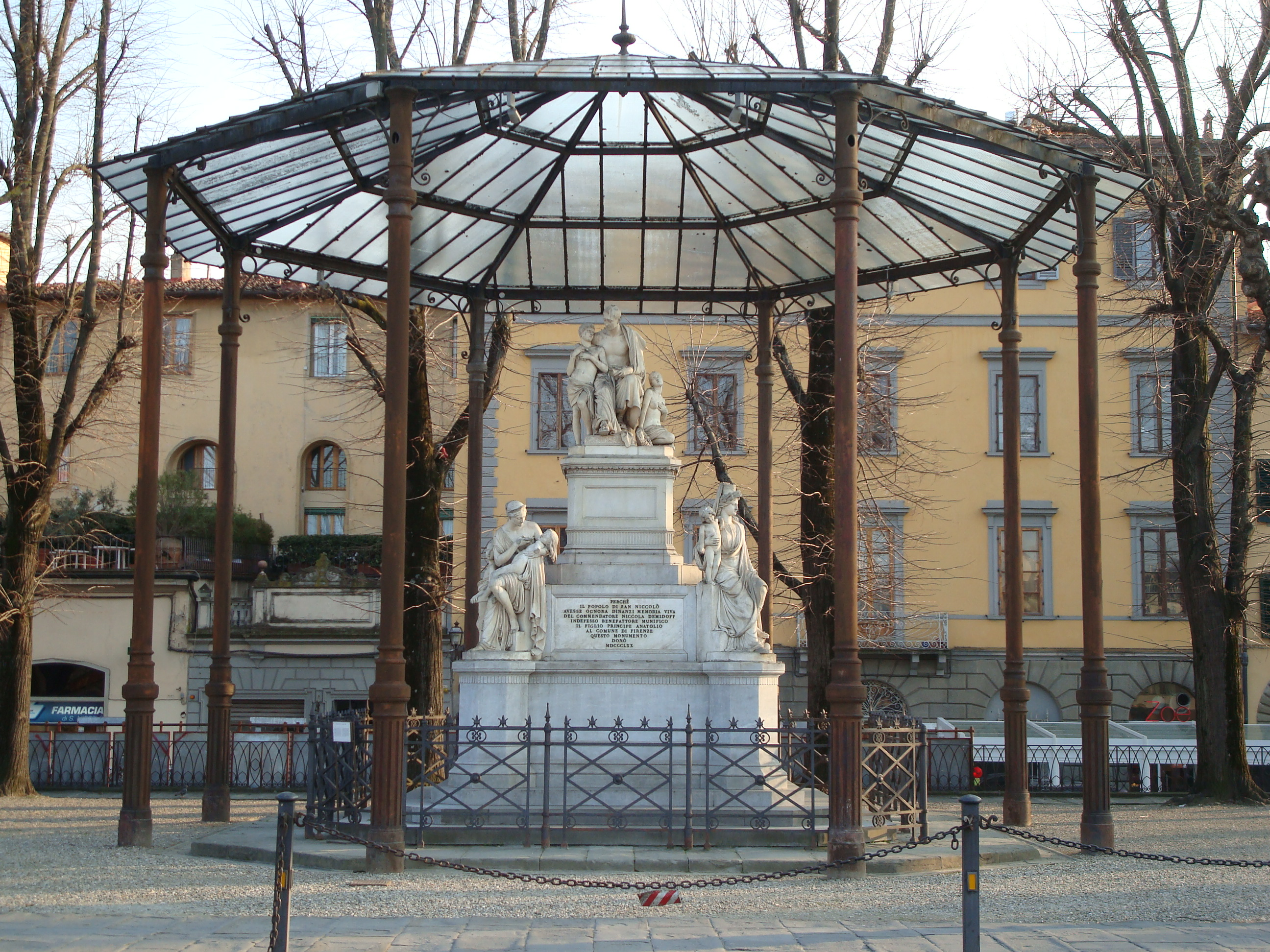 Monument Demidoff, Florence, sculpture de Lorenzo Bartolini, achevée par Pasquale Romanelli en 1871, située sur la "Piazza Demidoff" sur les bords de l'Arno